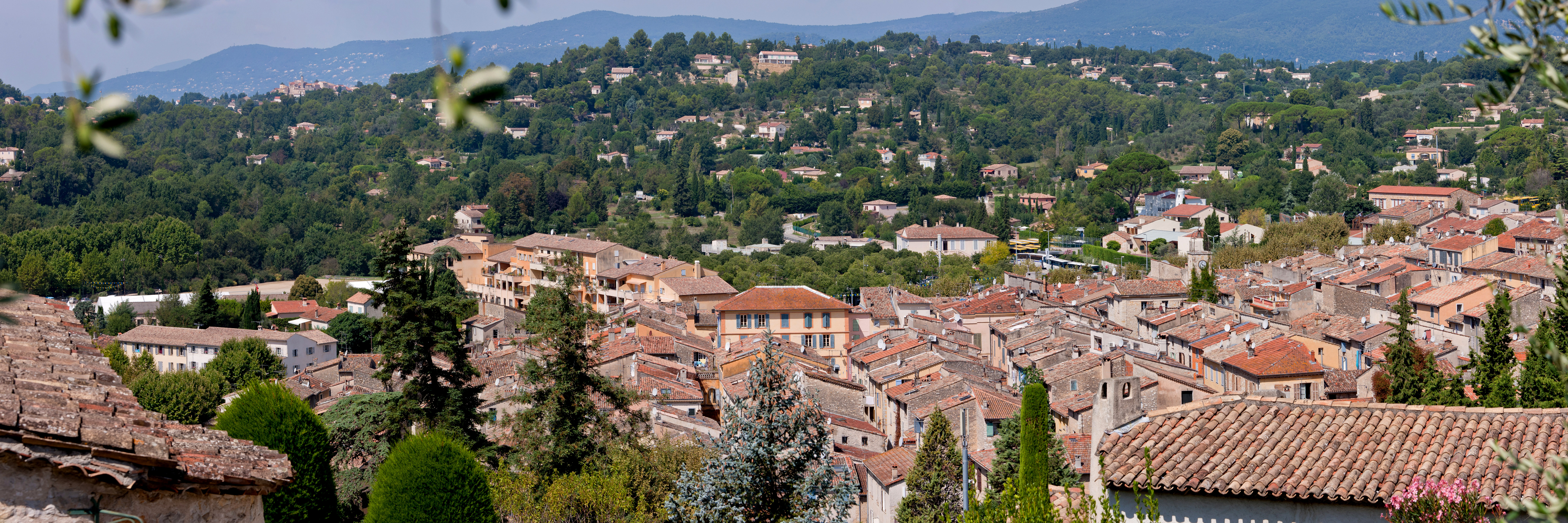 vue panoramique